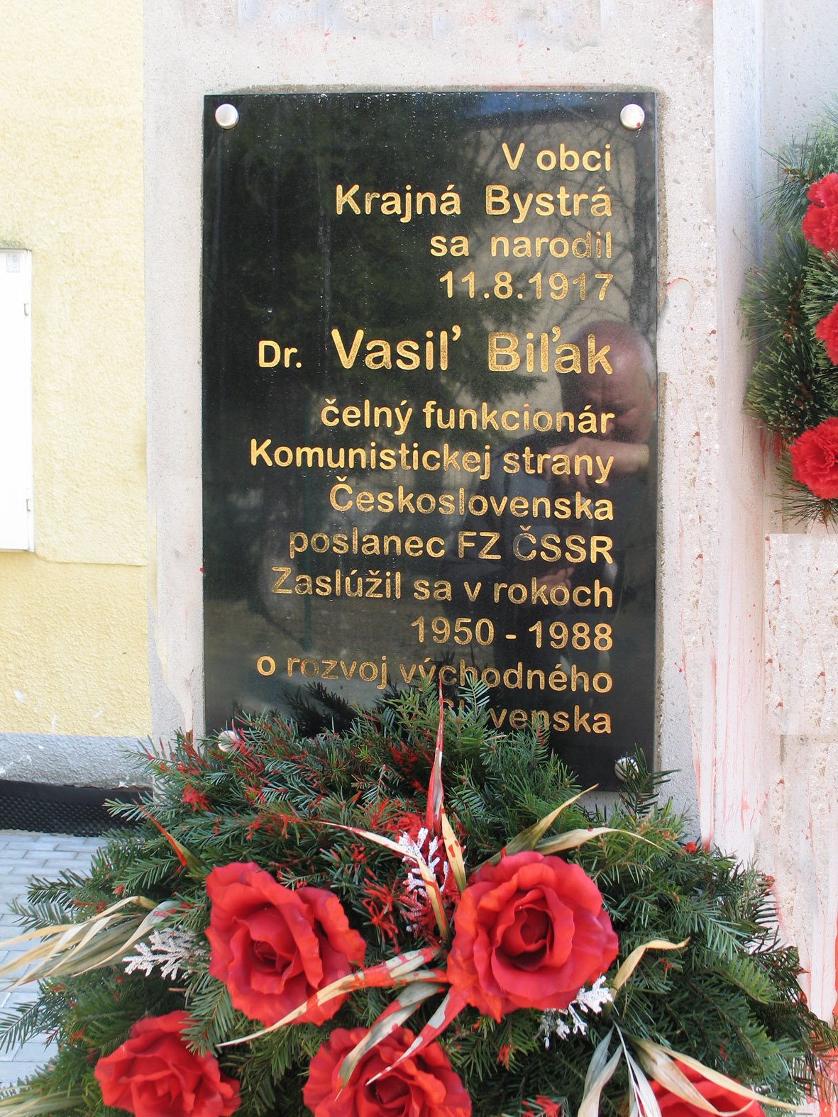 Pamätná tabuľa